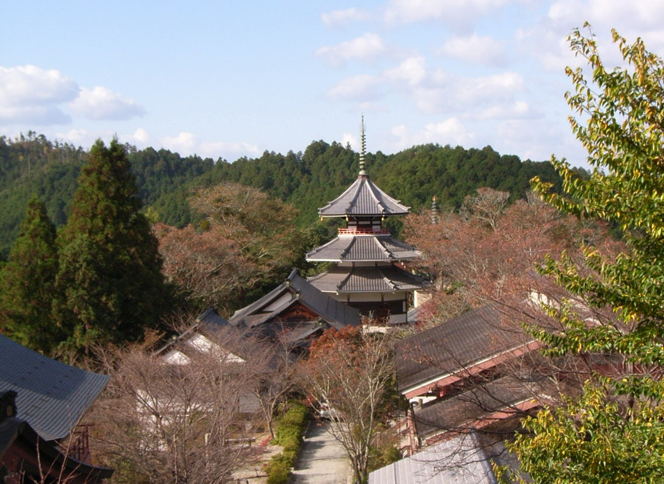 Ёсино - храм Кимпусэн-дзи Ёсино, Нара - храм Кимпусэн-дзи, пагода